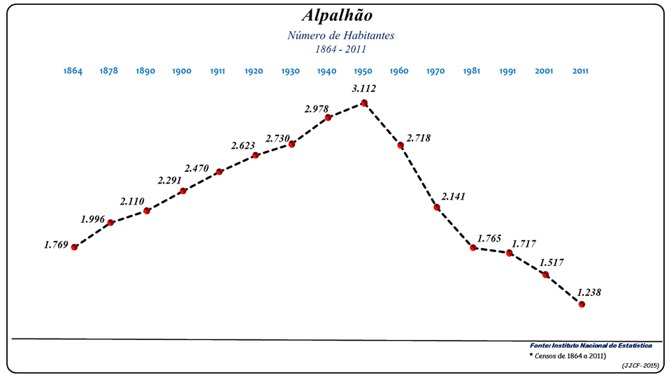 Evolução da População